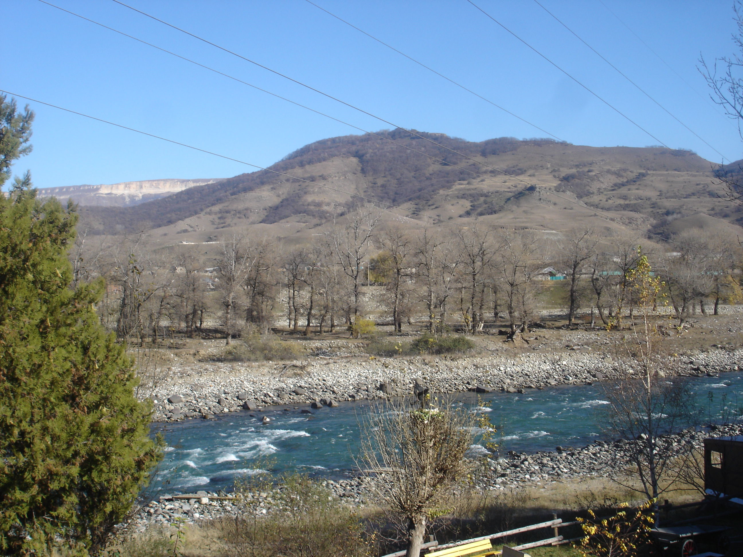 Карачаевск, республика Карачаево-Черкессия, Россия.